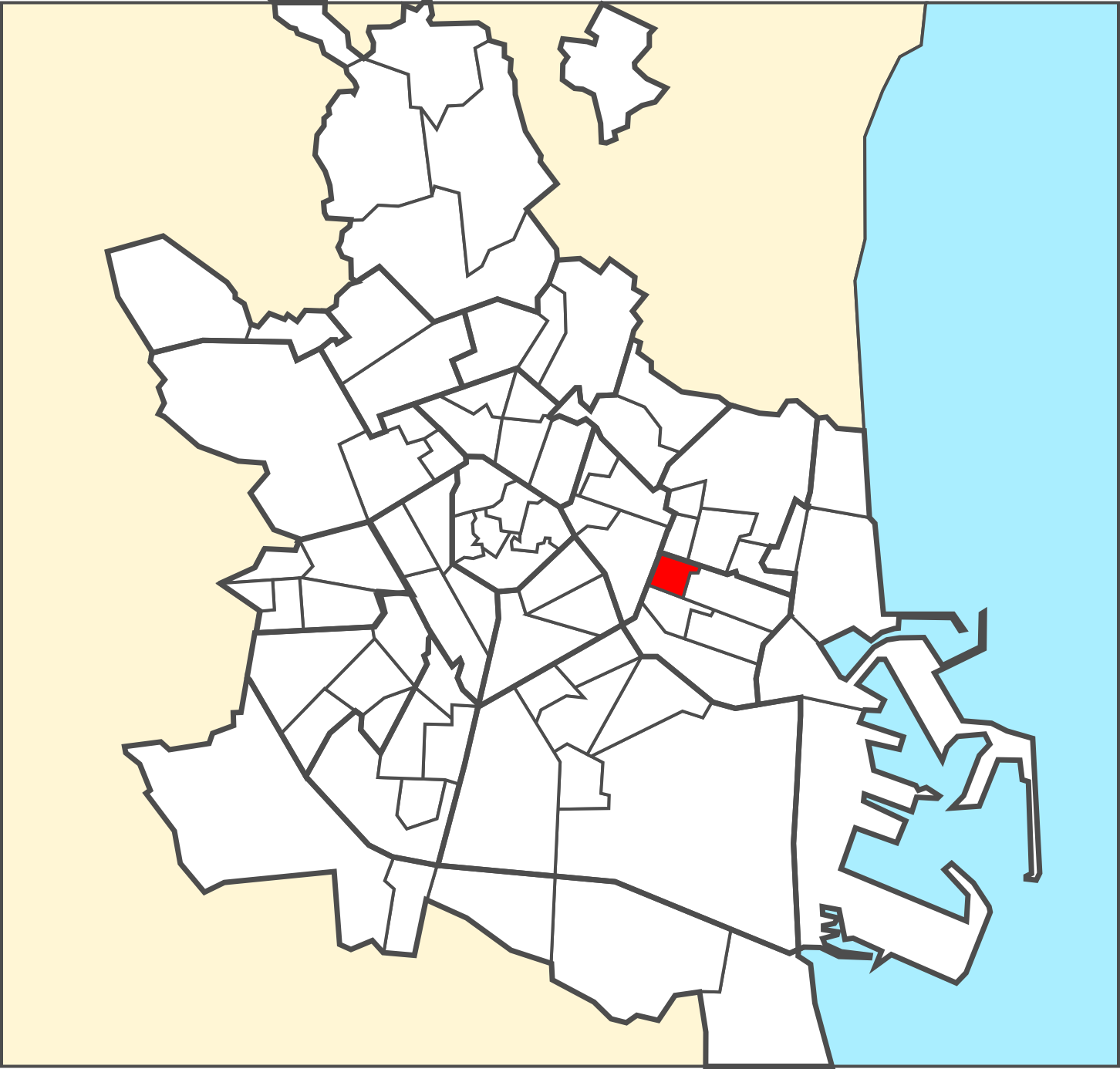 Localització del barri dins de la ciutat de València.